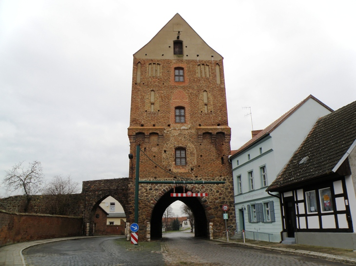 brama szczecińska